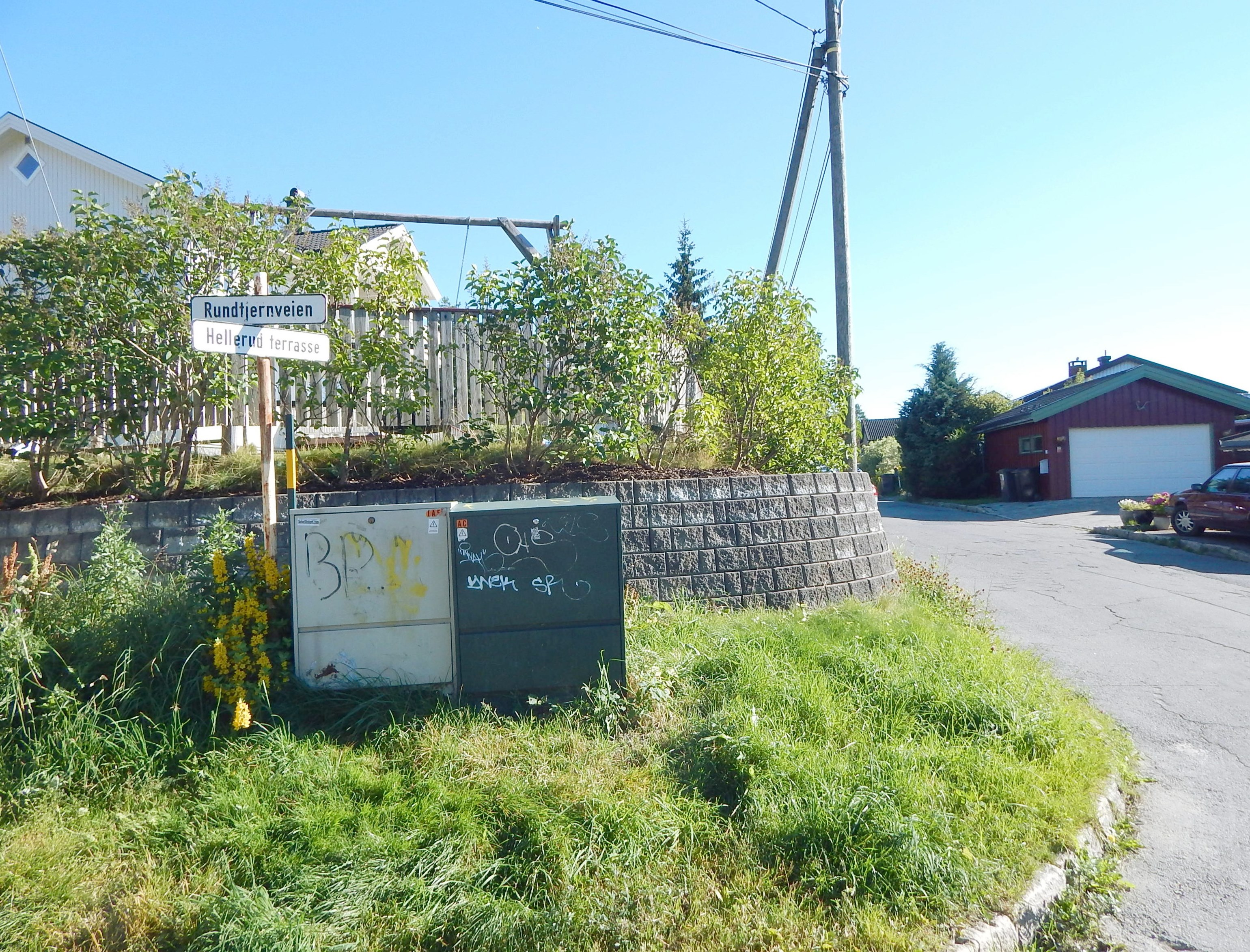 Hellerud terrasse sett fra Rundtjernveien